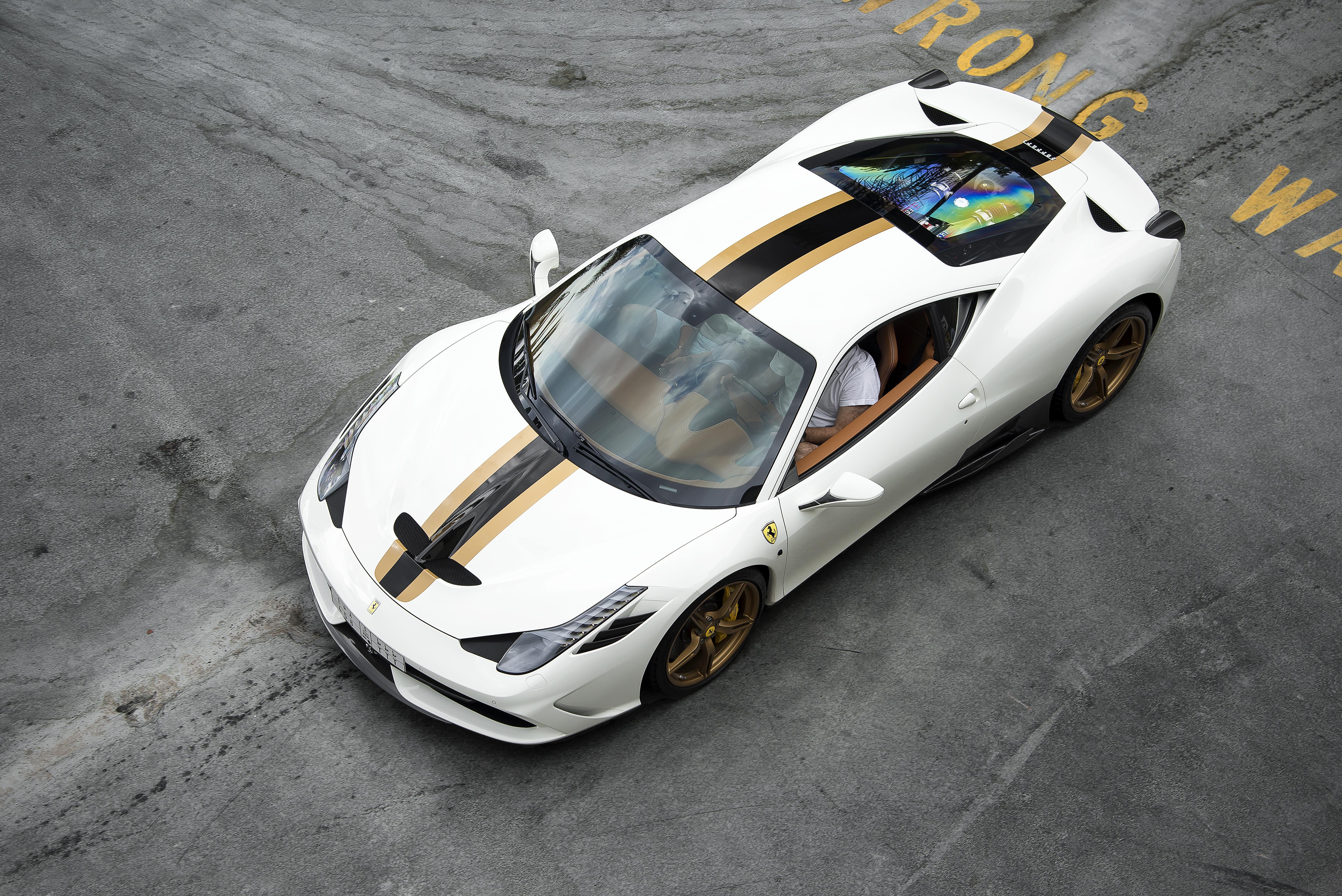 Ferrari 458 Speciale from Saudi Arabia